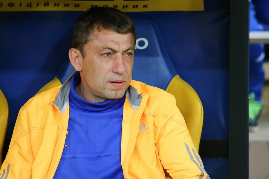 Александр Призетко - украинский футболист и тренер